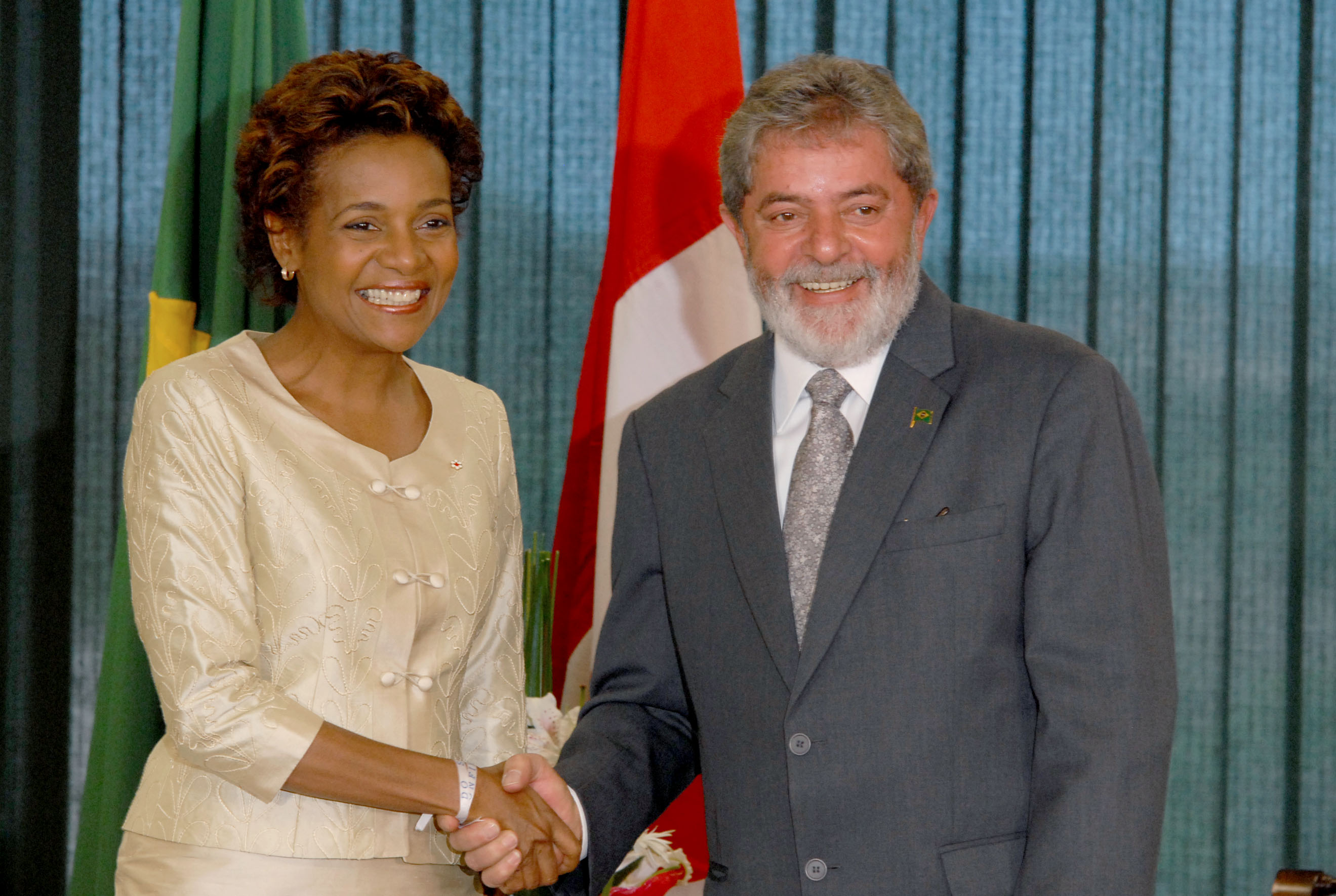 Brasília - O presidente Luiz Inácio Lula da Silva recebe a governadora-geral do Canadá, Michaëlle Jean, que visita o Brasil até 15 de julho.